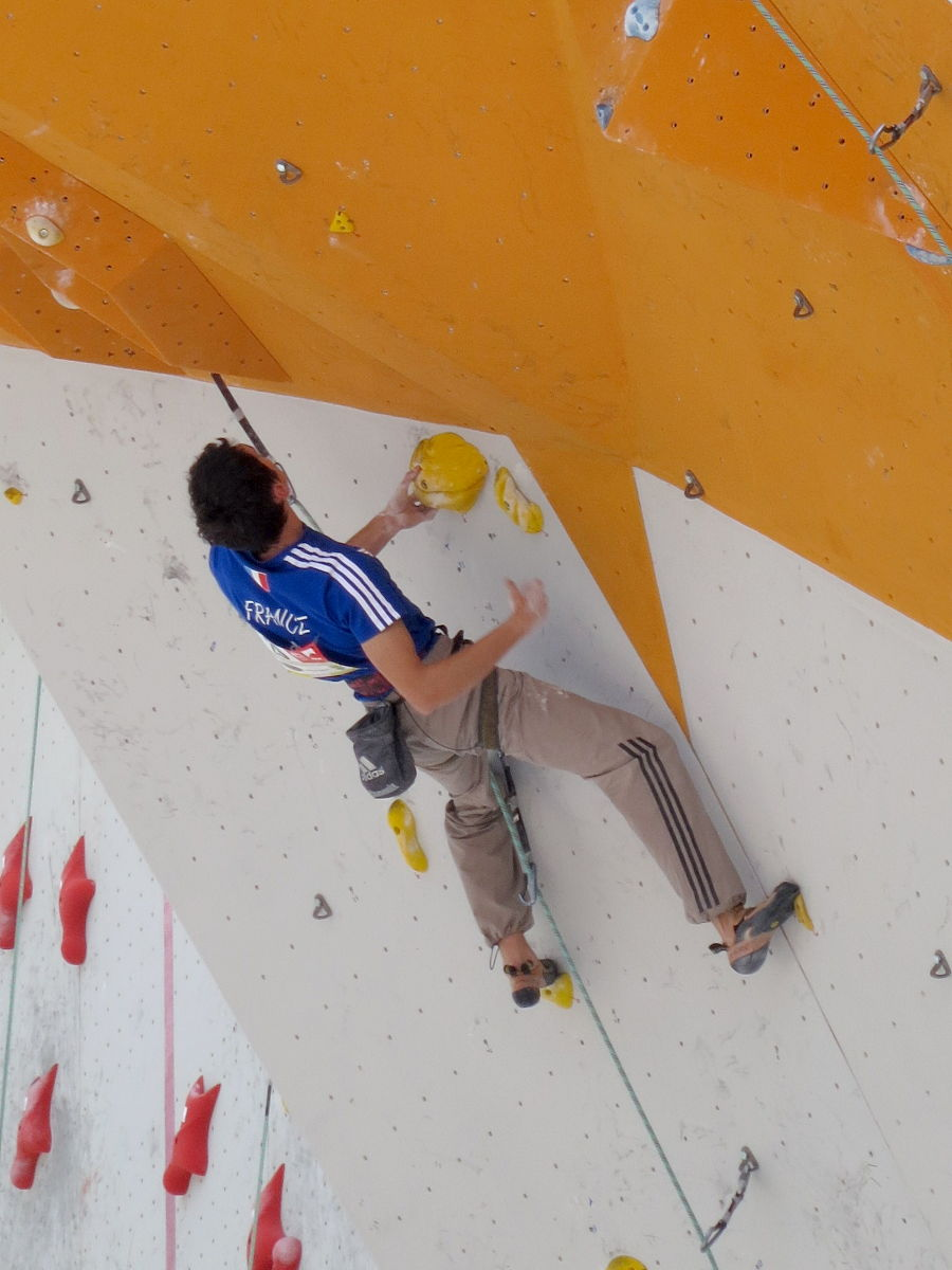 Romain Desgranges en demi-finale du championnat d'Europe d'escalade (difficulté) 2013 à Chamonix